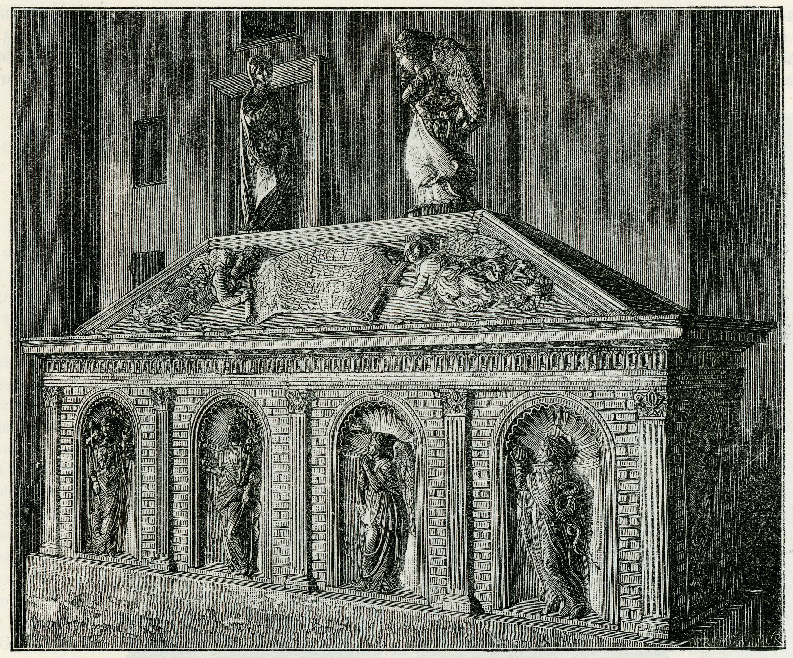 Forlì (Palazzo degli studi): urna marmorea del B. Marcolino Amanni , (xilografia Richard Brend'amour ).